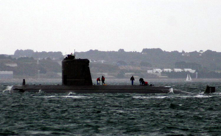 Le sous-marin français Ouessant en rade de Brest. Ce dernier sous-marin à propulsion diesel de la Marine nationale, après avoir été retiré du service actif le 13 juillet 2001, a été réactivé en 2005. Après une IPER à Brest, il est prêté à la Marine malaisienne pour formation de ses équipages.